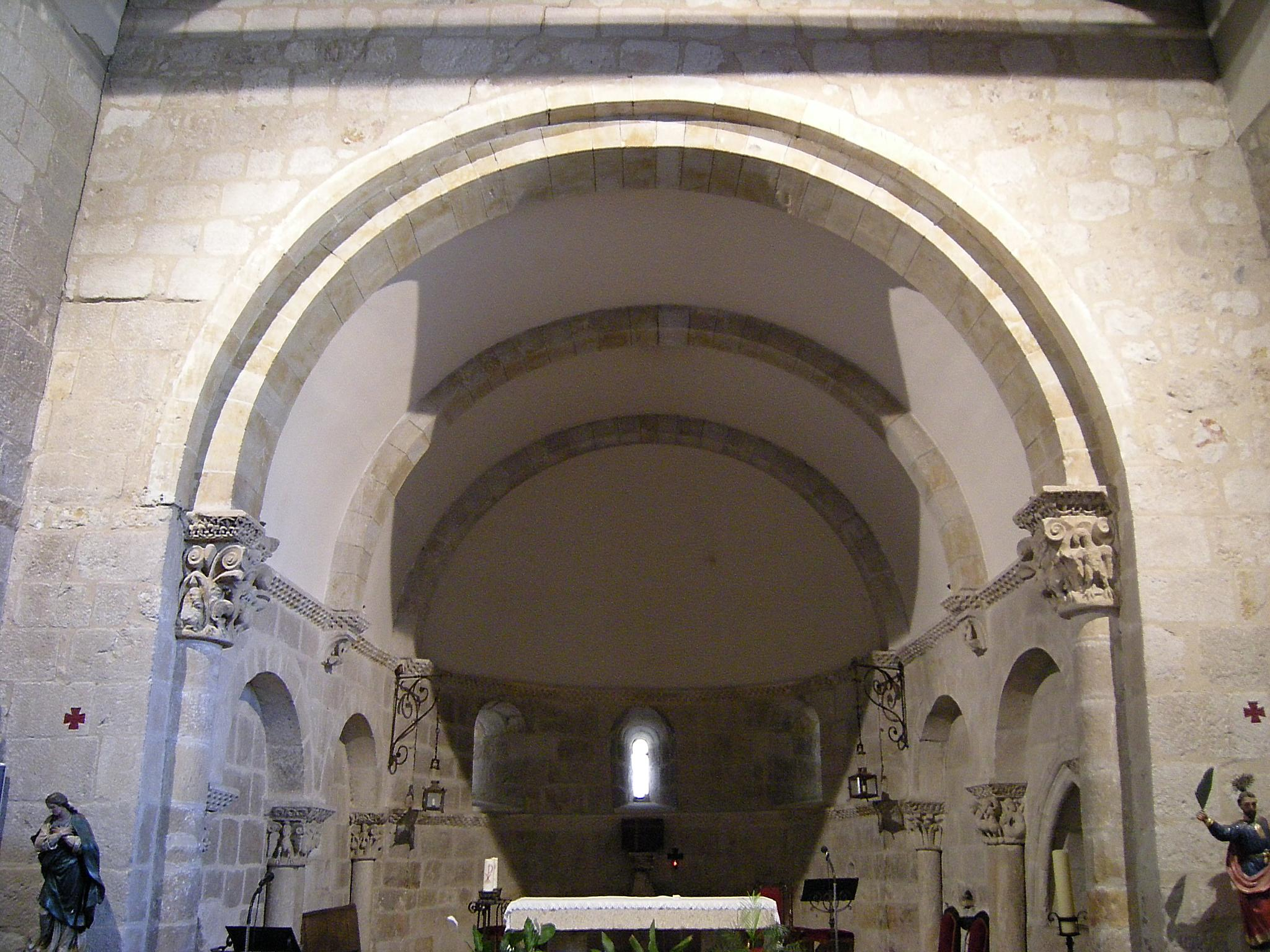 El interior del presbiterio presenta cuatro arcos ciegos de medio punto, repartidos en los muros norte y sur, apoyados sobre columnas con capiteles historiados. Se cubre con bóveda de cañón el el tramo recto y cuarto de esfera en el tramo final.